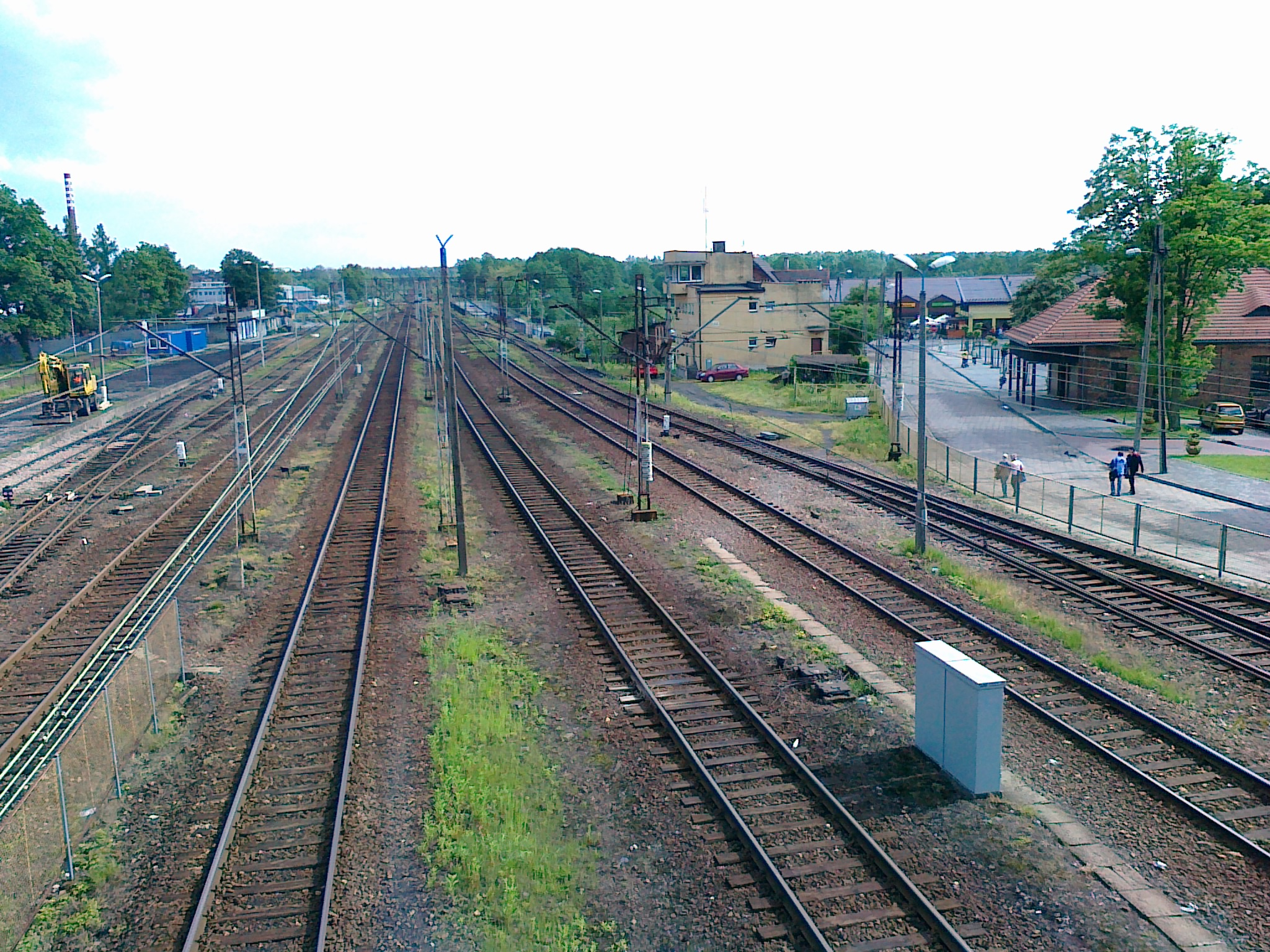 Kalety - stacja widok z kładki na południe